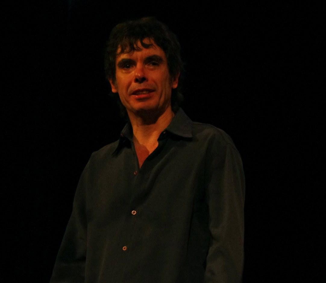 Fotografía del músico uruguayo, Fernando Cabrera, en el marco de un concierto brindado en el Teatro Politeama de Canelones (Uruguay)